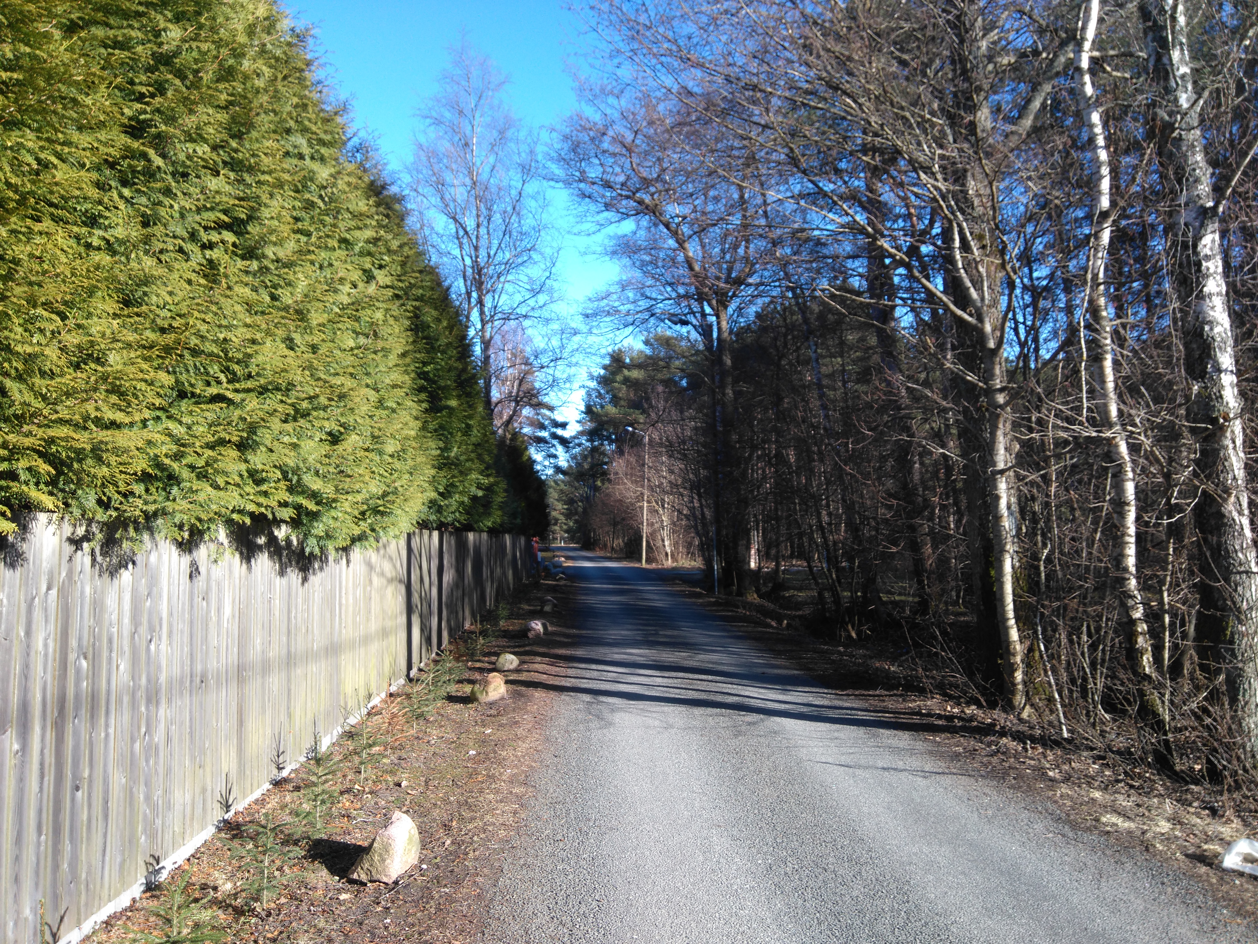 Tiskre tee